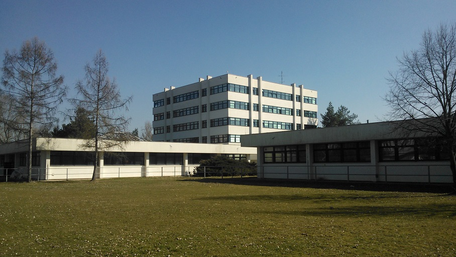 Jihočeská univerzita v Českých Budějovicích, budova: Pavilon B Zemědělské fakulty